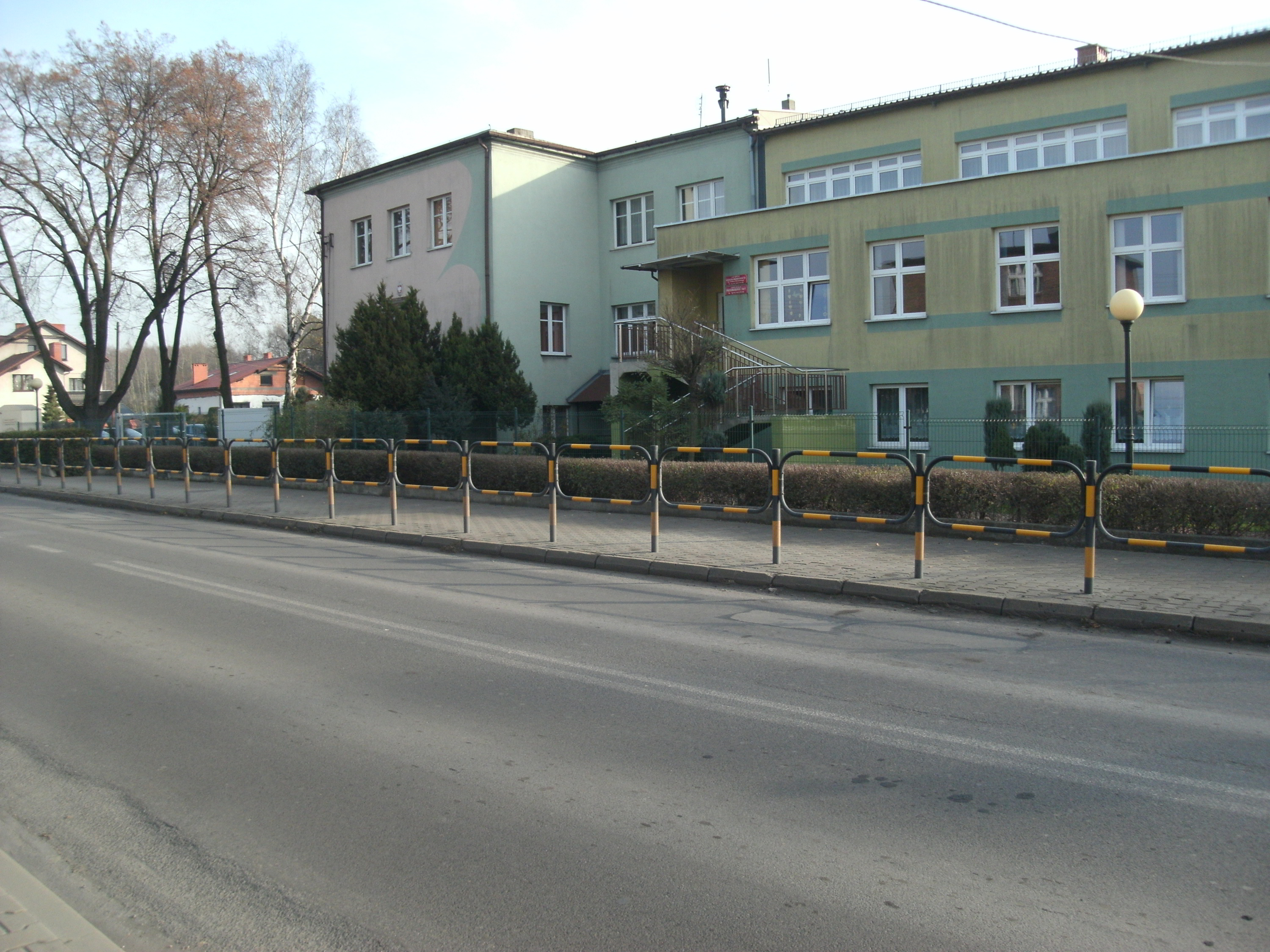 Miejska Szkoła Podstawowa nr 3 w Krywałdzie (Knurów).